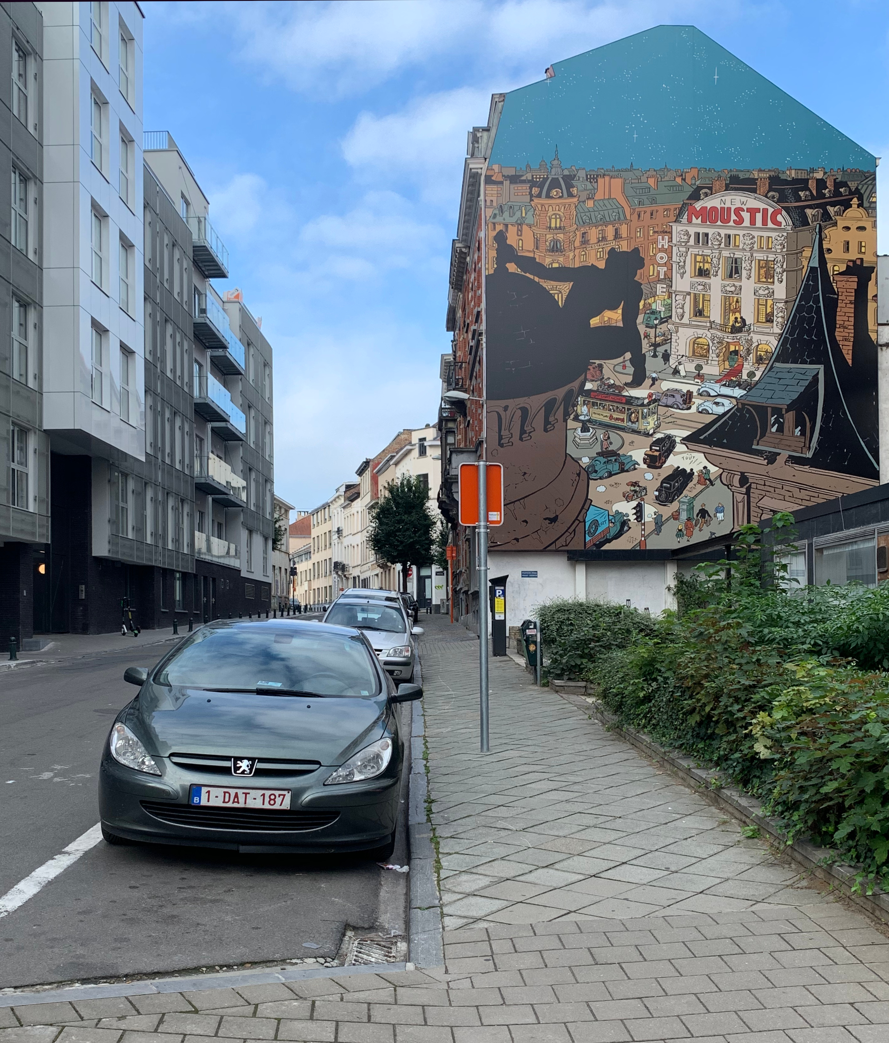 Rue de la Croix, 2 (mur peint BD, Spirou).